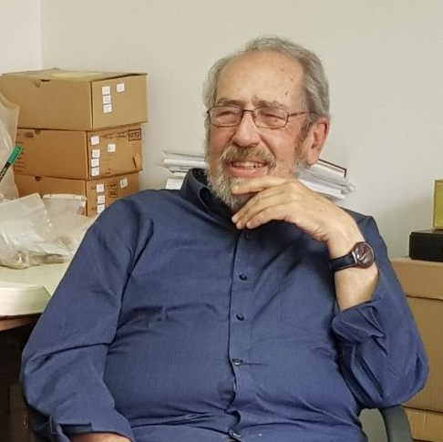 הארכאולוג גבריאל ברקאי